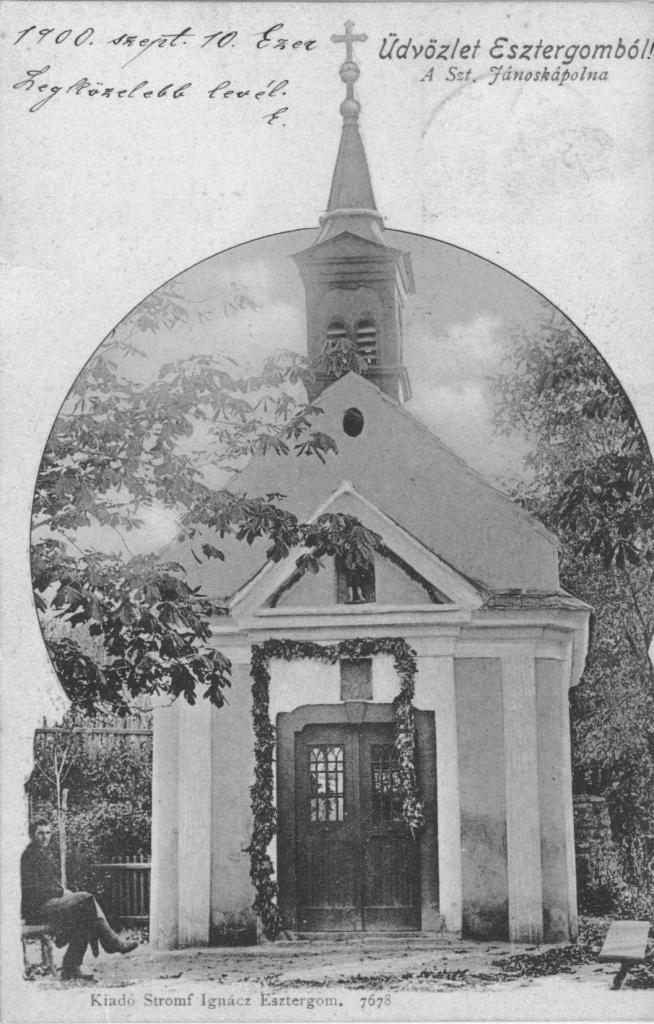 Az esztergomi Szentjánoskúti kápolna